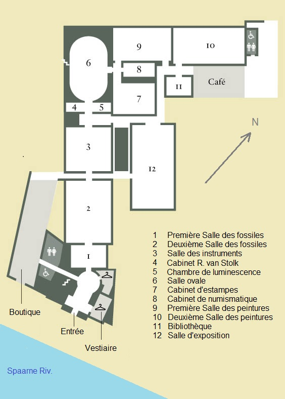 Plan du musée Teyler de Haarlem, version française